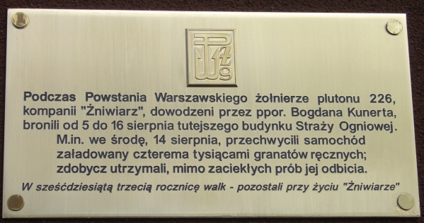 Tablica upamiętniająca walki zgrupowania AK Żniwiarz znajdująca sią na ścianie budynku Straży Pożarnej przy ul. Slowackiego w Warszawie